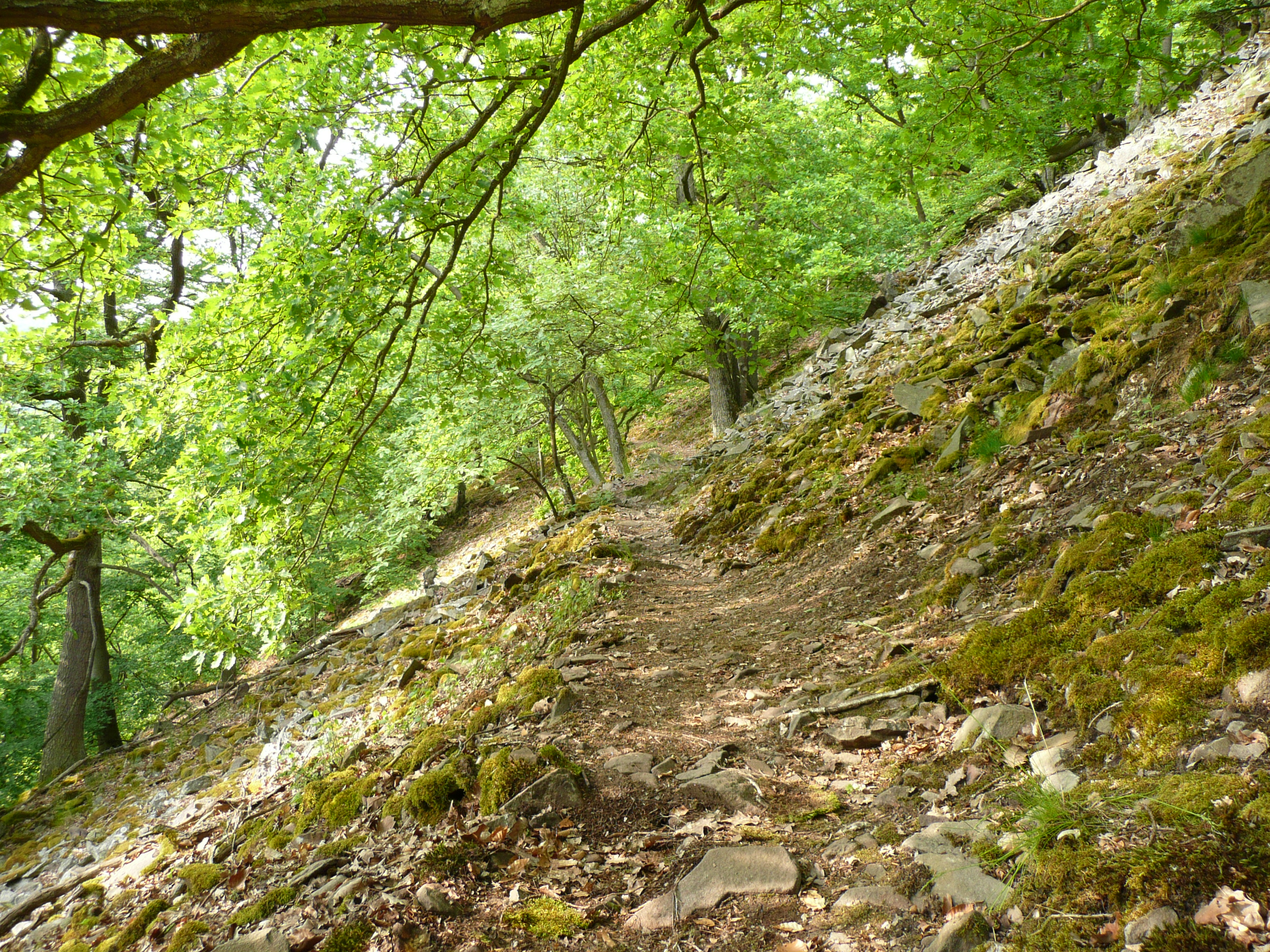 Blocksteinhalde am Urwaldsteig (Knorreichenstieg) im Naturschutzgebiet Hünselburg am Edersee im März.